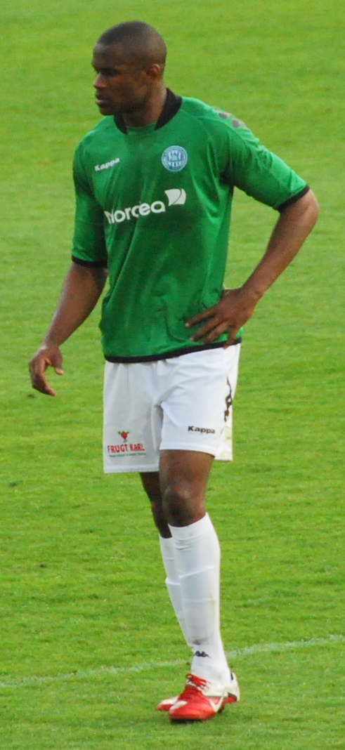 Fodboldspilleren Babajide Ogunbiyi fra Viborg FF. Her i 1. divisionskampen mod Hobro IK på Viborg Stadion.